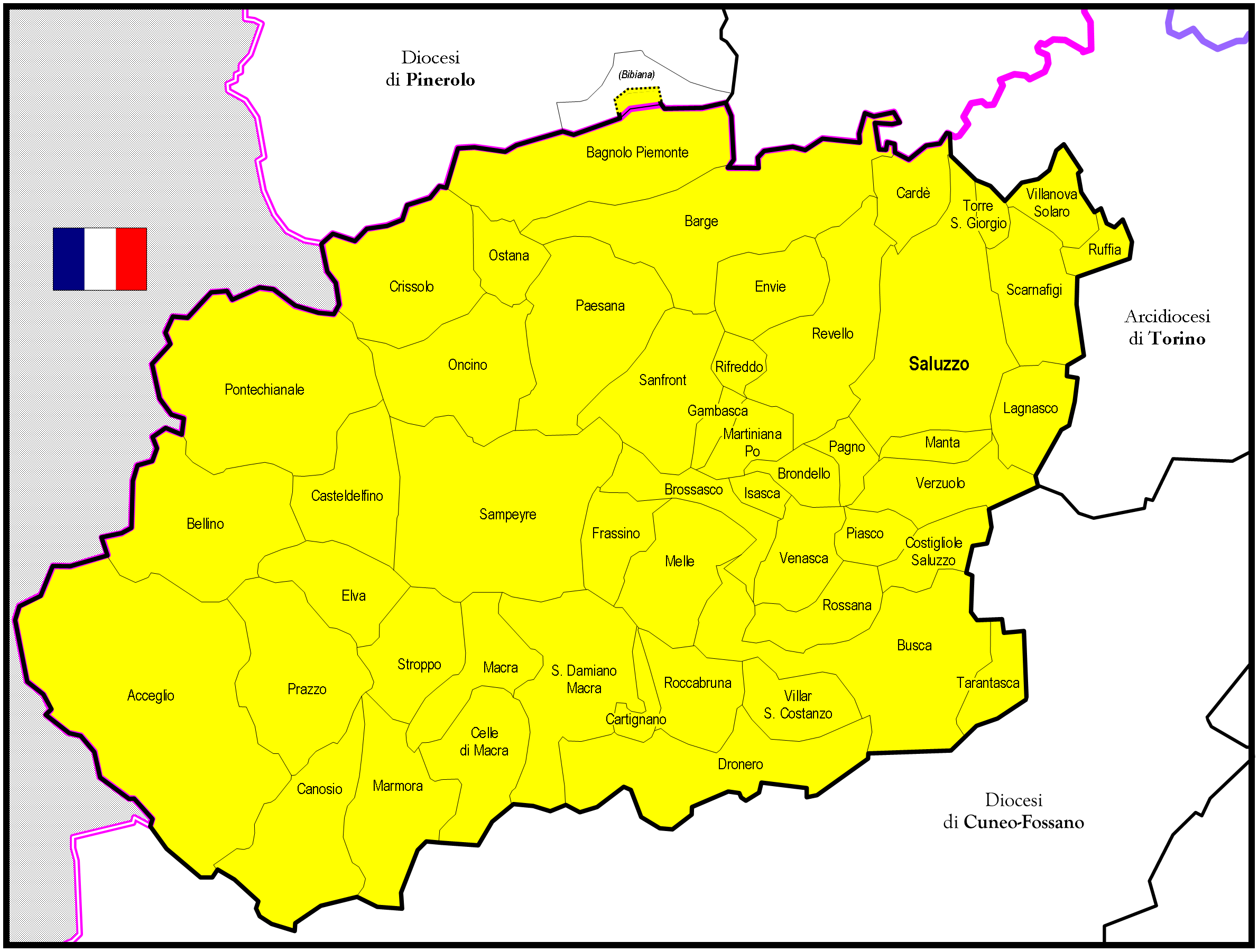 Mappa della Diocesi di Saluzzo (Italia)